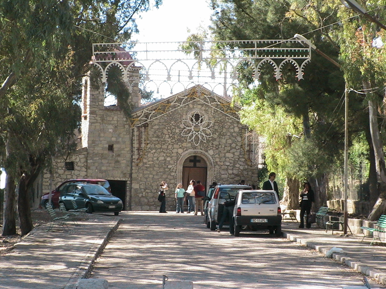 Casteltermini(AG), Eremo di Santa Croce